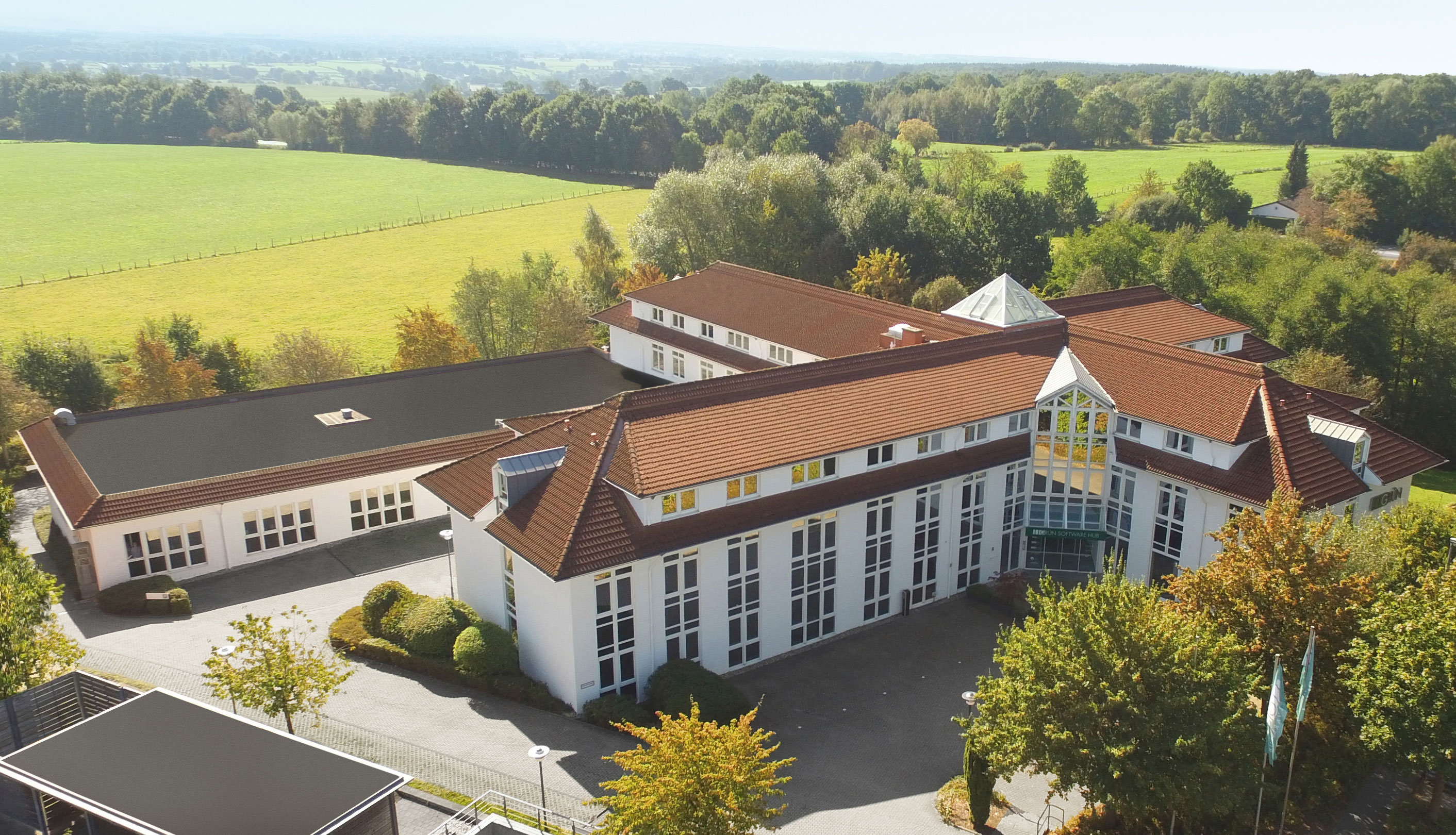 Headquarter der GRÜN Software AG in Aachen.